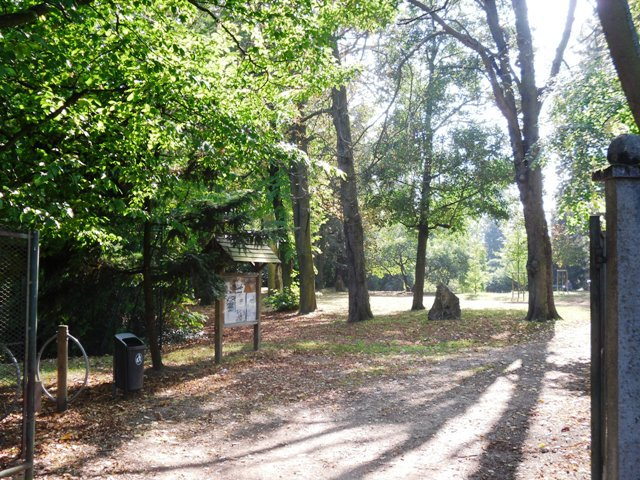 Le square Louise de Vilmorin de Verrières-le-Buisson (91)